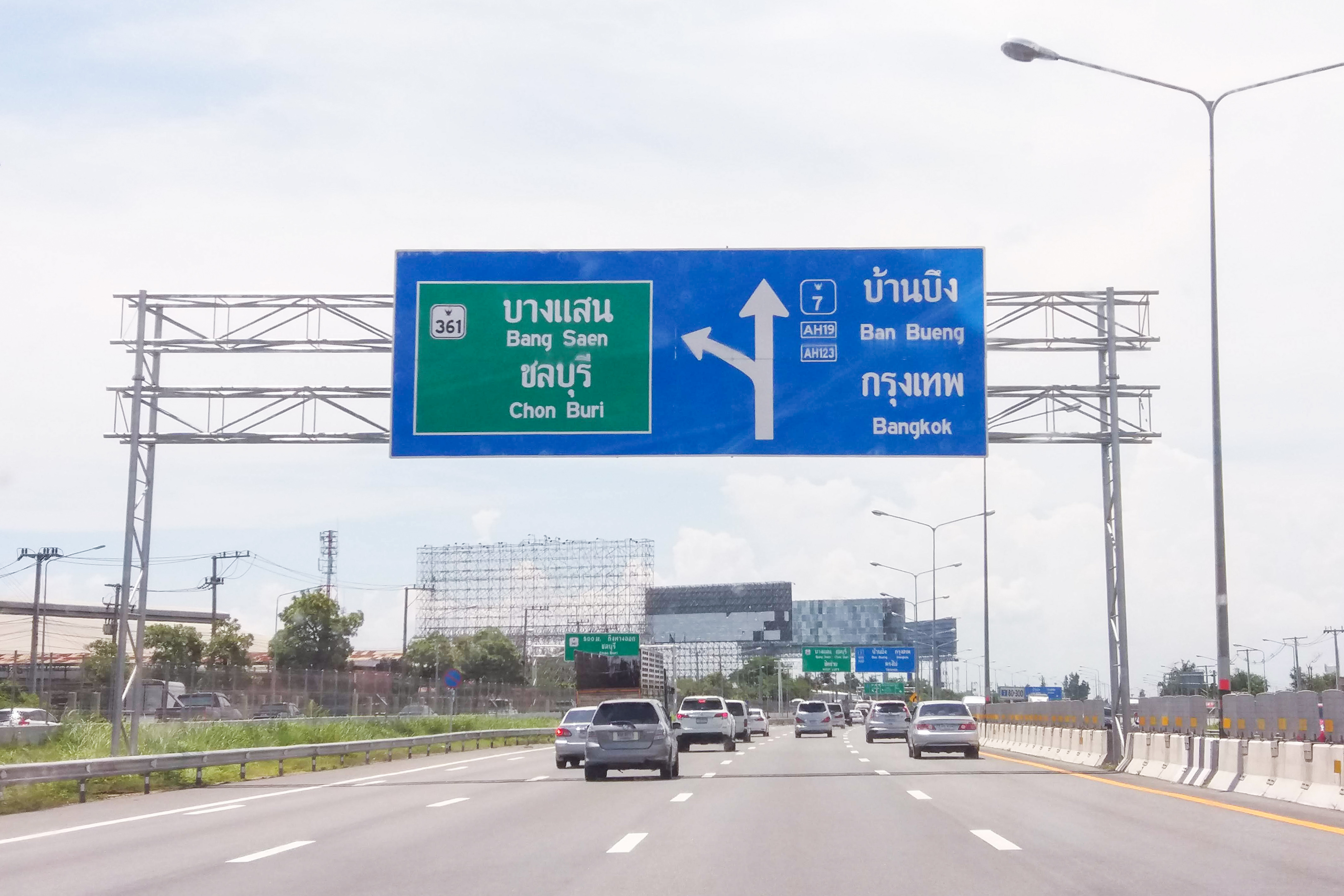 Head to Bangkok